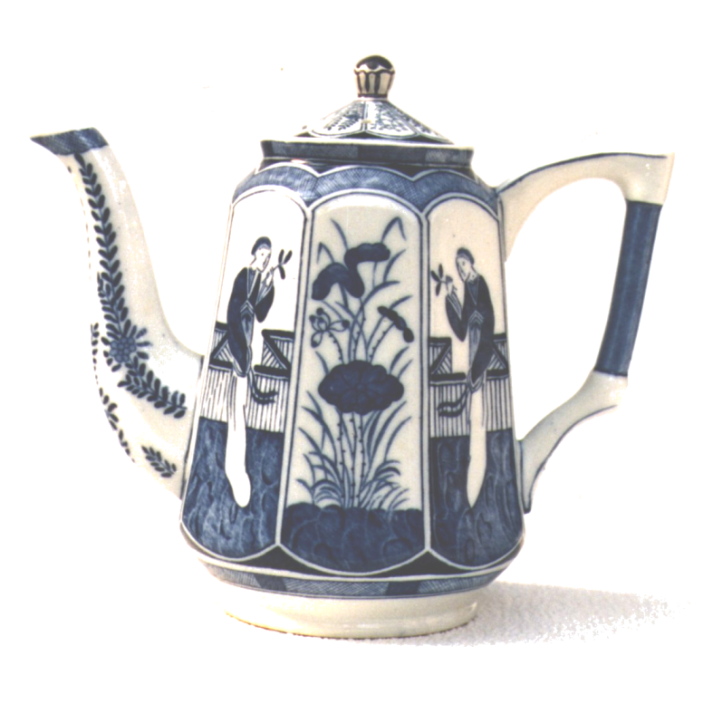 Hoekig Lange Lijs theepot